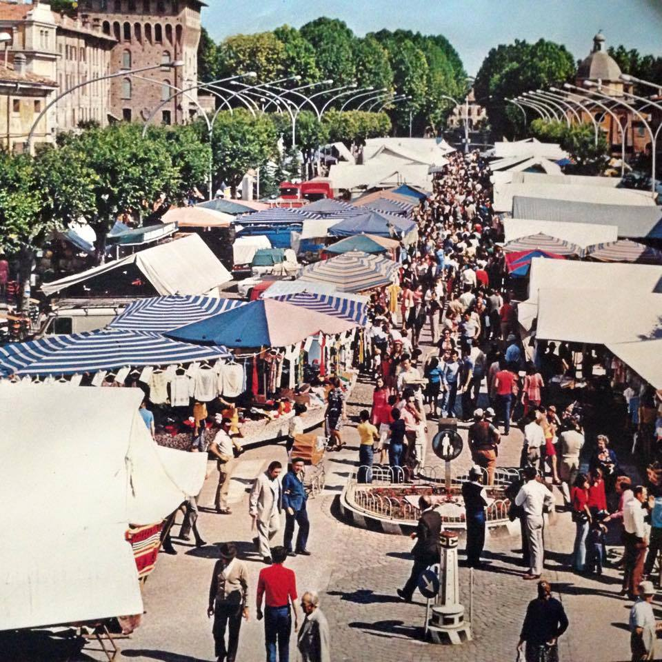 Il mercato settimanale del sabato in piazza Costituente a Mirandola nel 1975